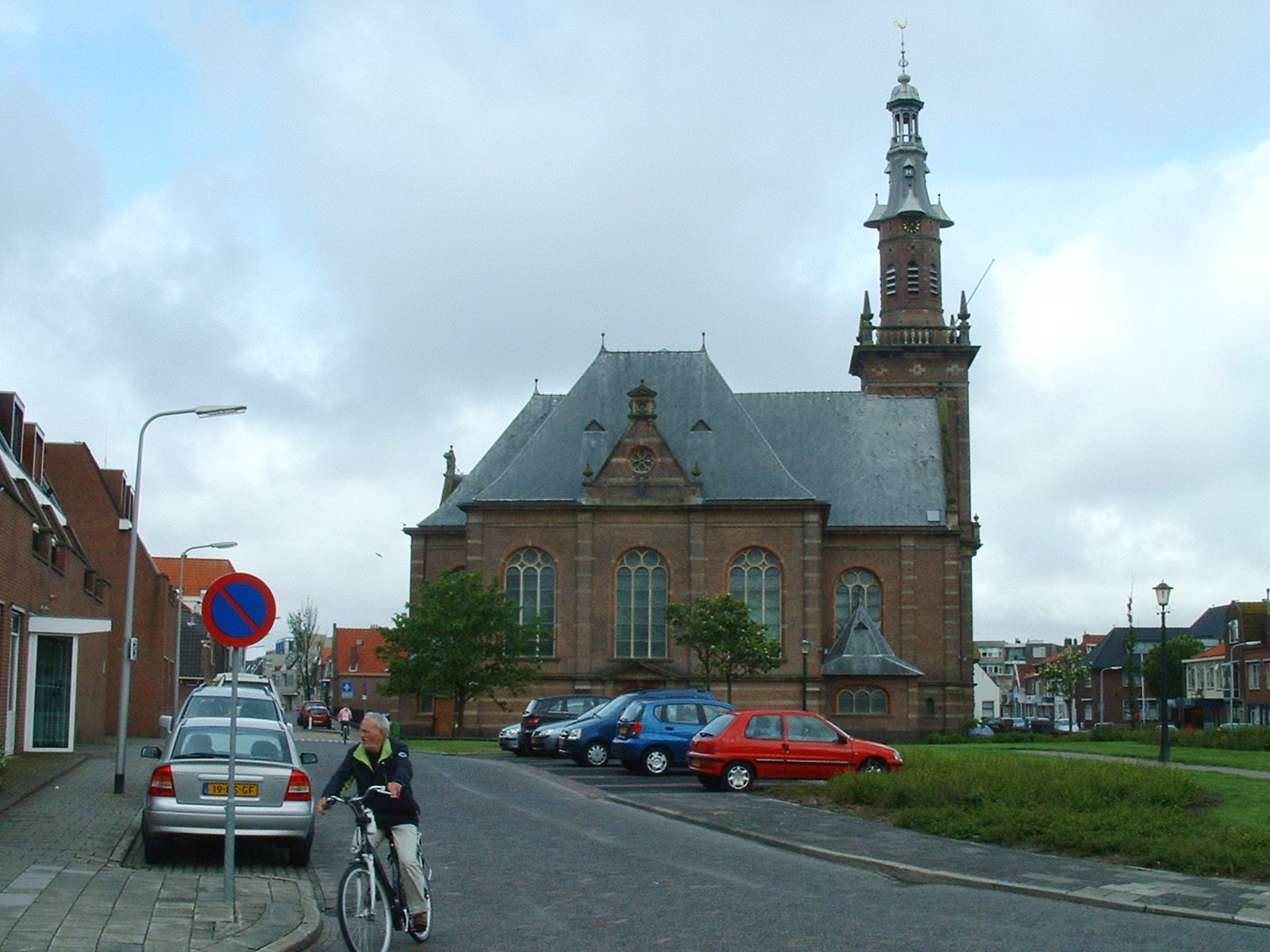 Nieuwe Kerk, Katwijk